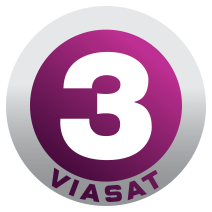 TV3 AS logo.